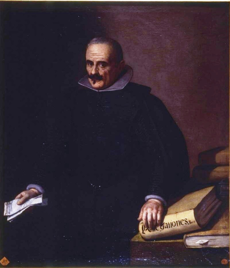 Retrato del dramaturgo, filólogo y jurisconsulto español Francisco de la Cueva (1550-1621).